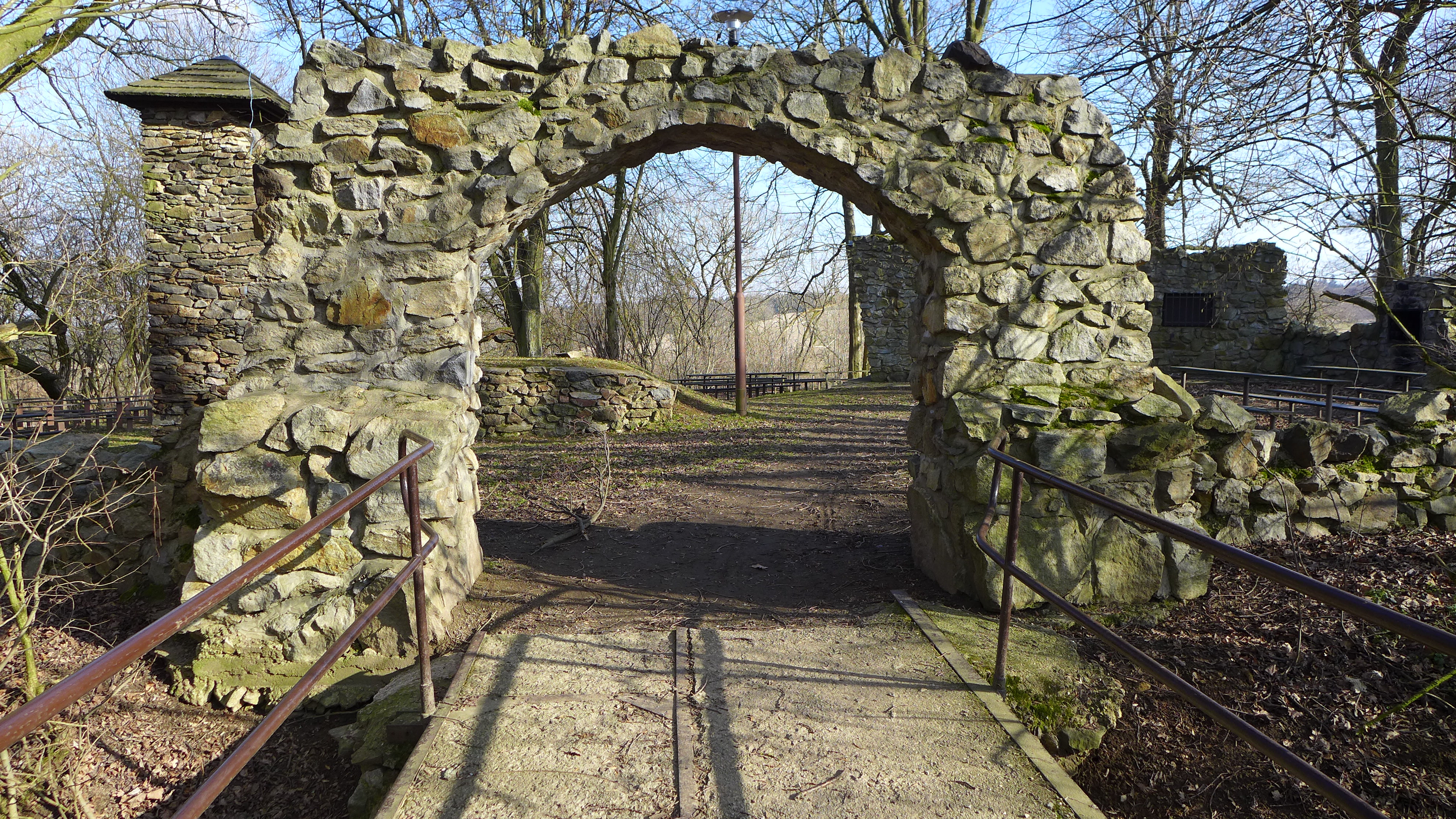 Tvrz, zřícenina, Štěměchy